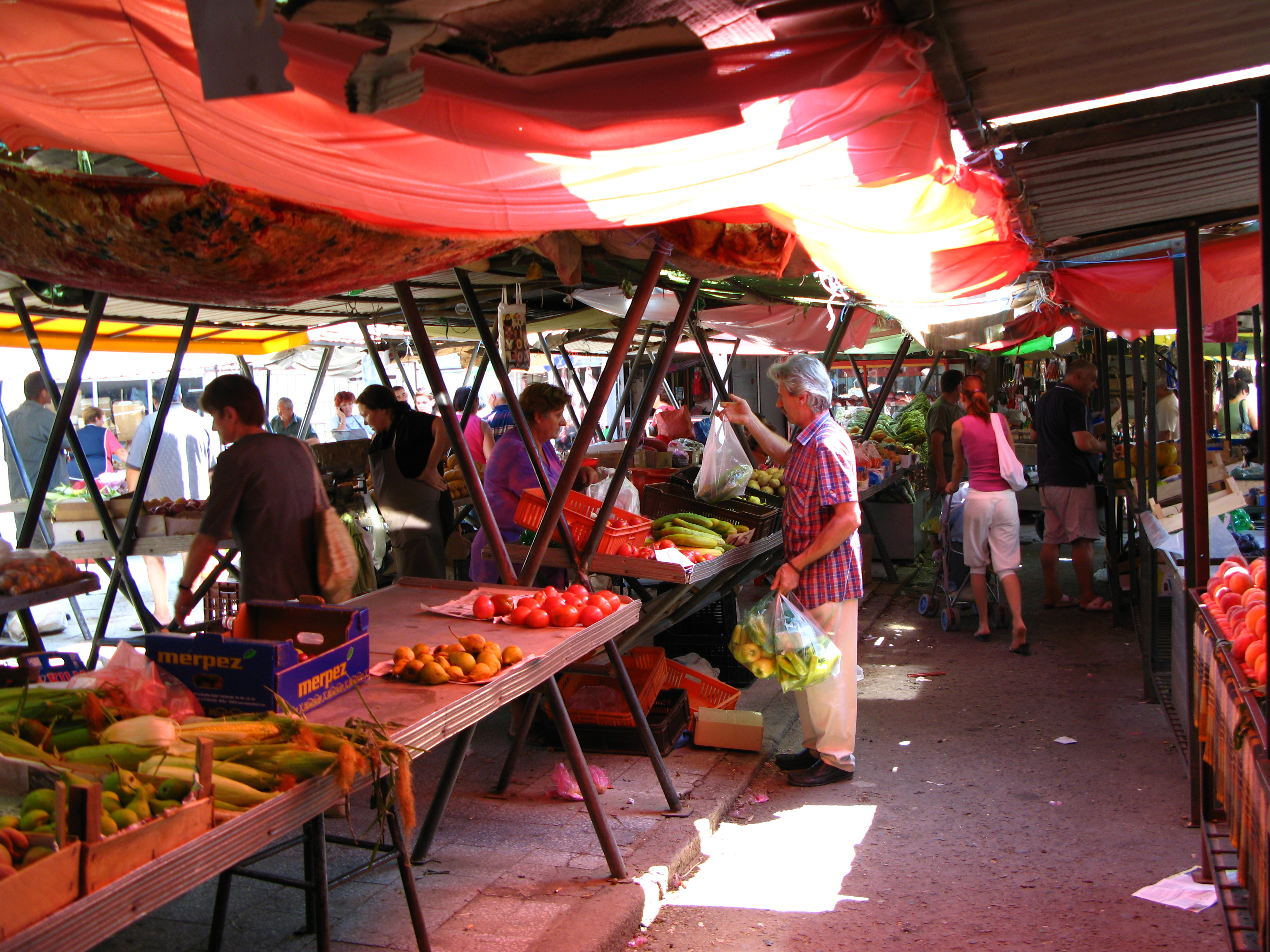 Битољски пазар.